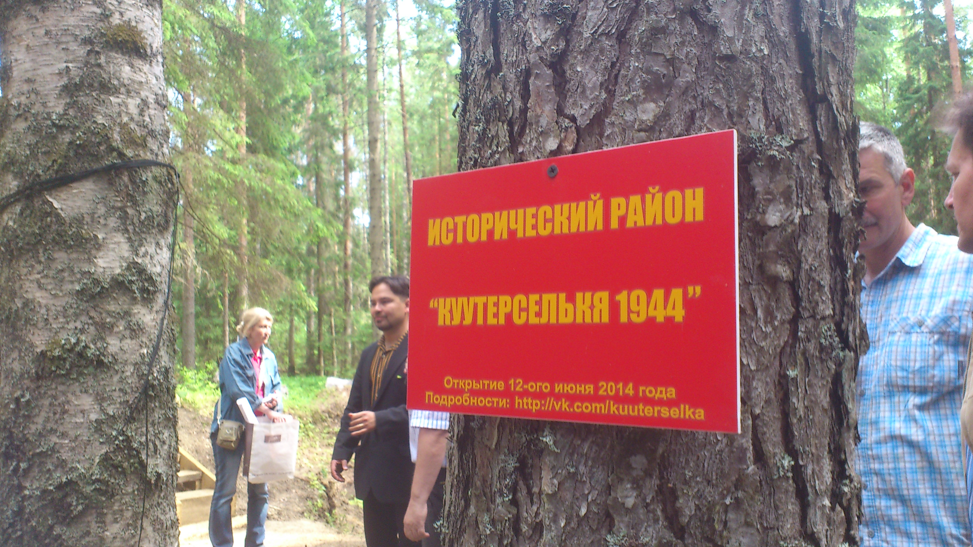 Исторический район «Куутерселькя 1944» на финской оборонительной линии ВТ (Карельский вал) в районе посёлка Лебяжье, Выборгский район Ленинградской области.